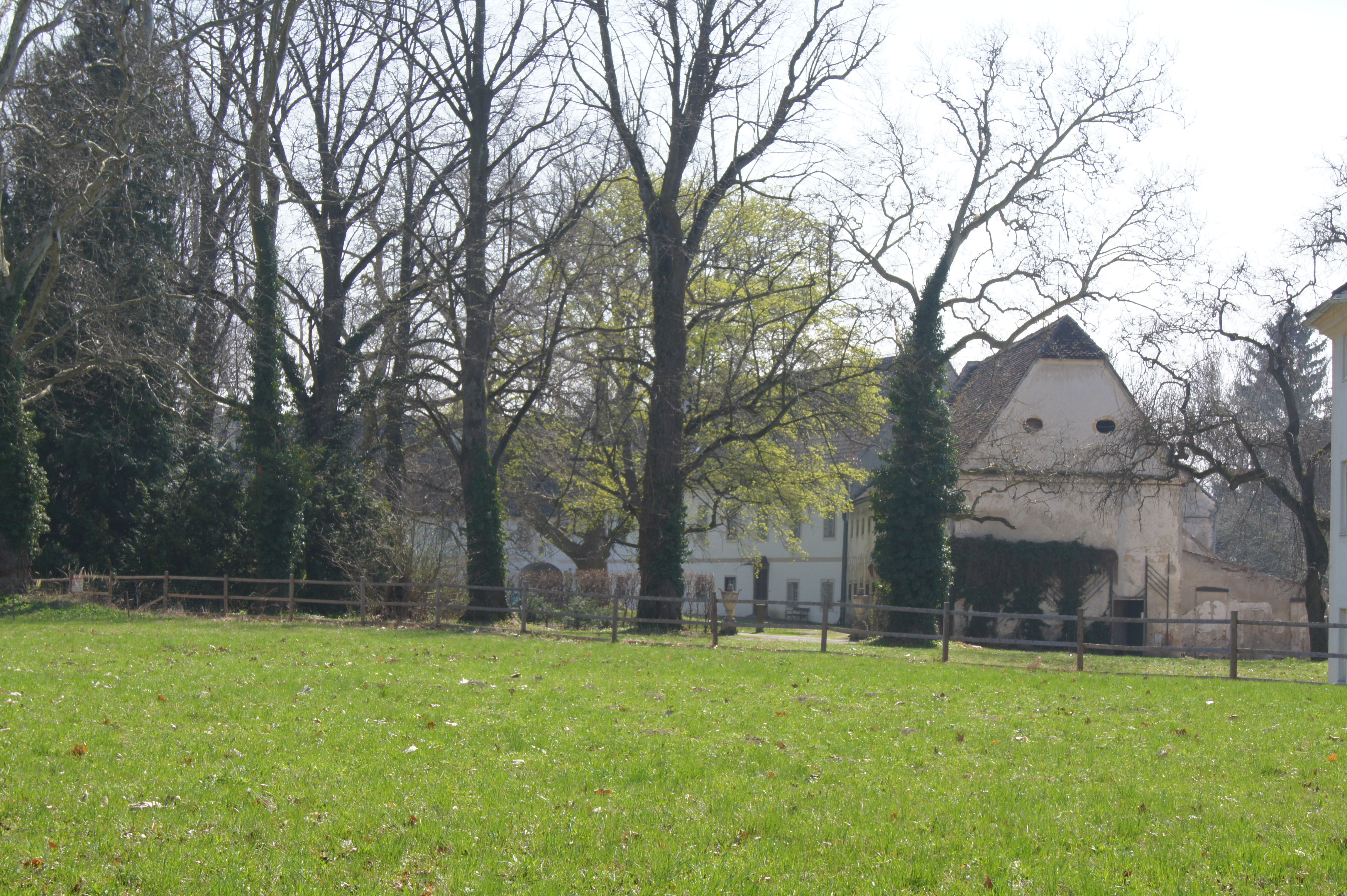 Das "Altschloss" beim Schloss Friedau